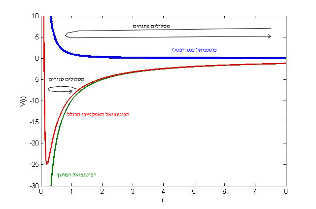 איור המחשה לבעיה הדו-גופית רישיון נוצר על ידי משתמש:טוקיוני